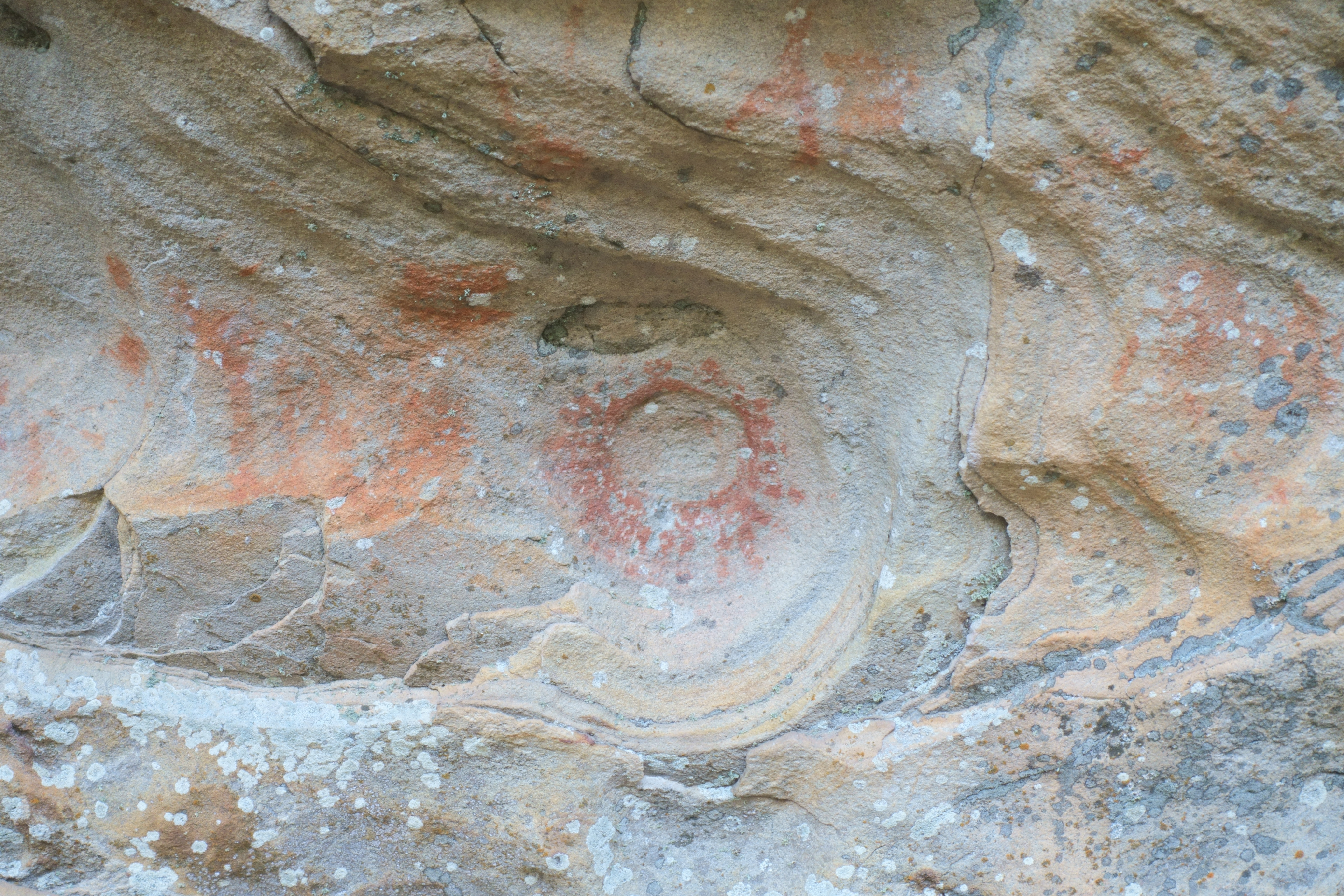 Estación rupestre de El Mirador, en el monte Valonsadero (Soria, España).